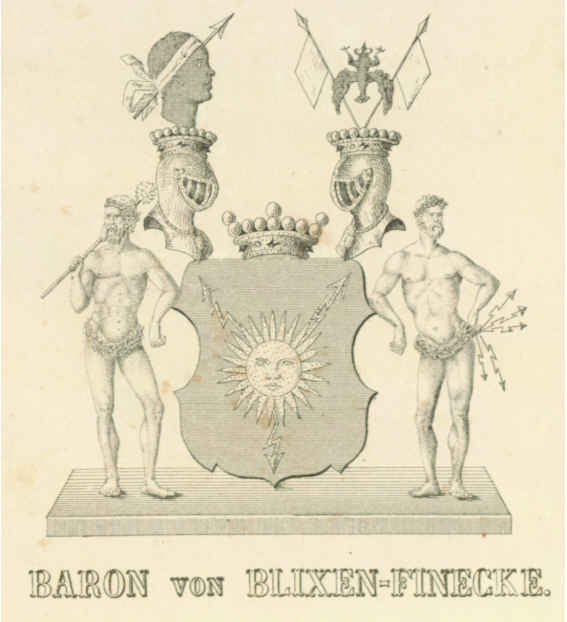 Wappenzeichnung aus Bamihl, Pommersches Wappenbuch von 1846